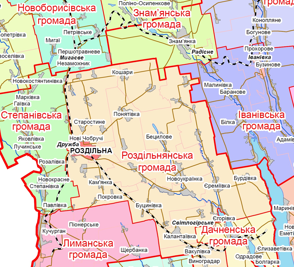 Мапа Роздільнянської ОТГ